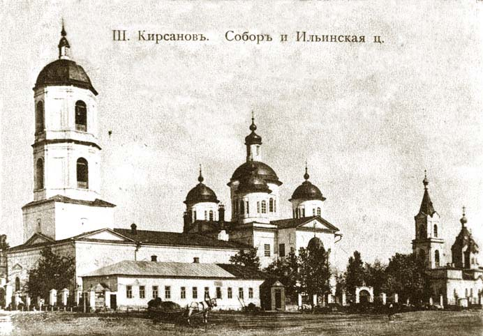 Кирсанов. Успенский Собор и Ильинская церковь XIXвека. (фото-открытка нач.XX века).